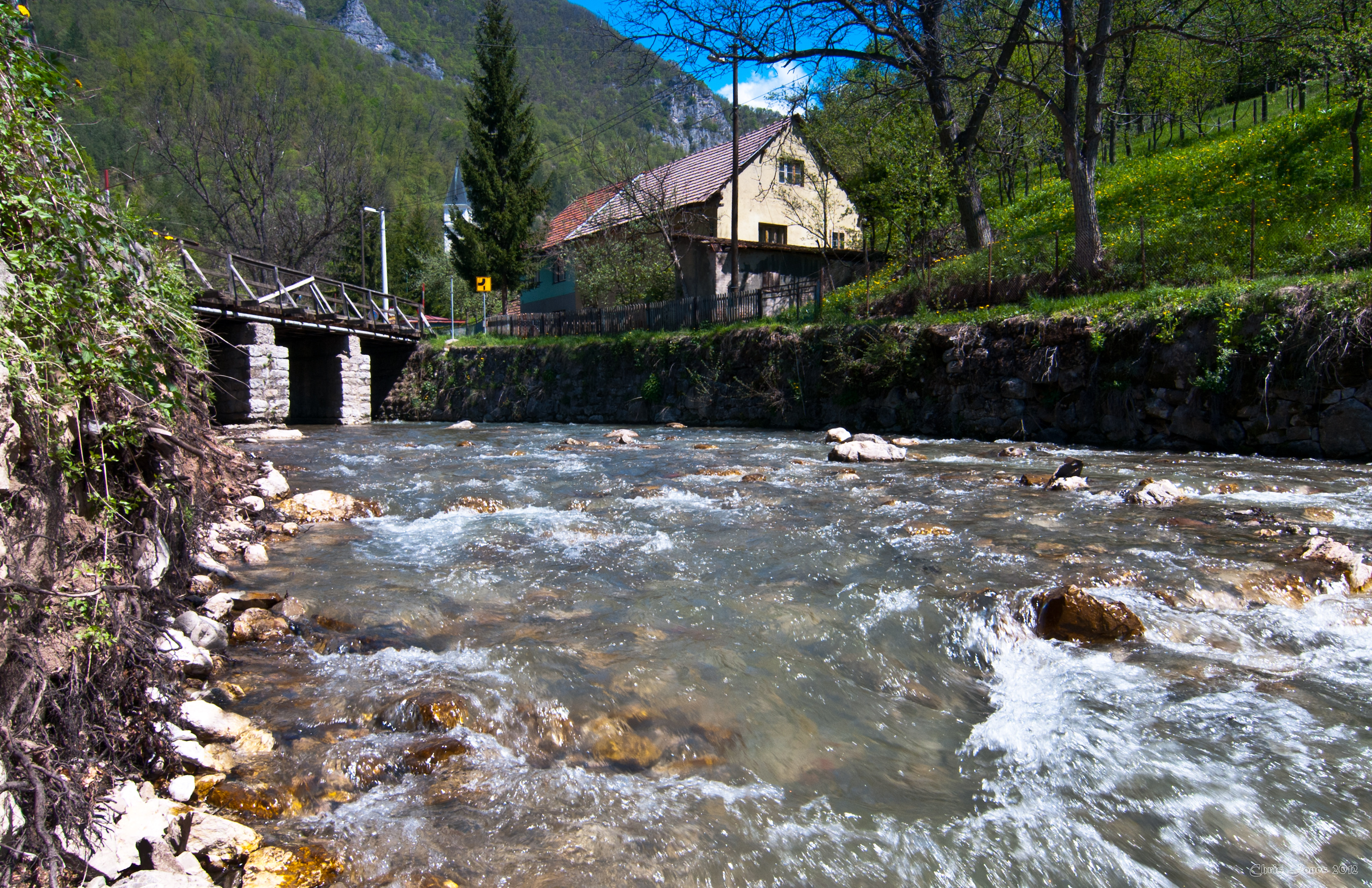 Bosnia and Herzegovina Apr-30-2012 050